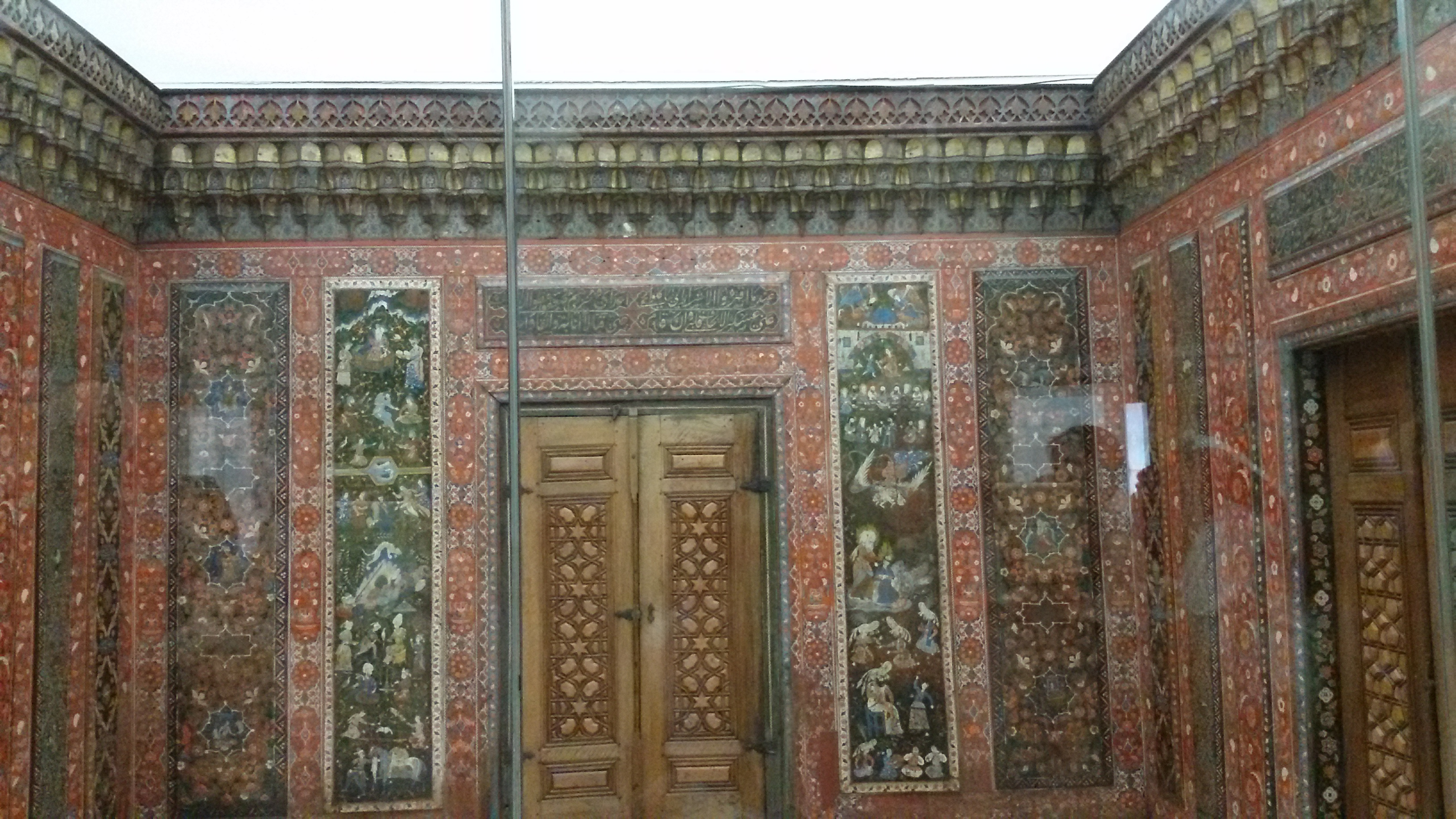 Aleppo Room